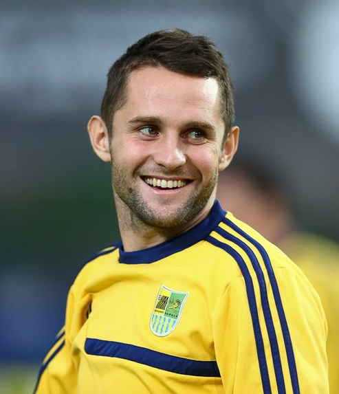 Денис Кулаков під час виступів за ФК Металіст